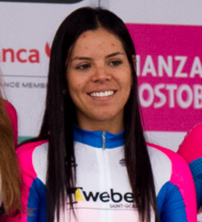 Jessenia Meneses en la presentación del Weber Shimano Ladies Power en la Vuelta a Colombia Femenina 2017